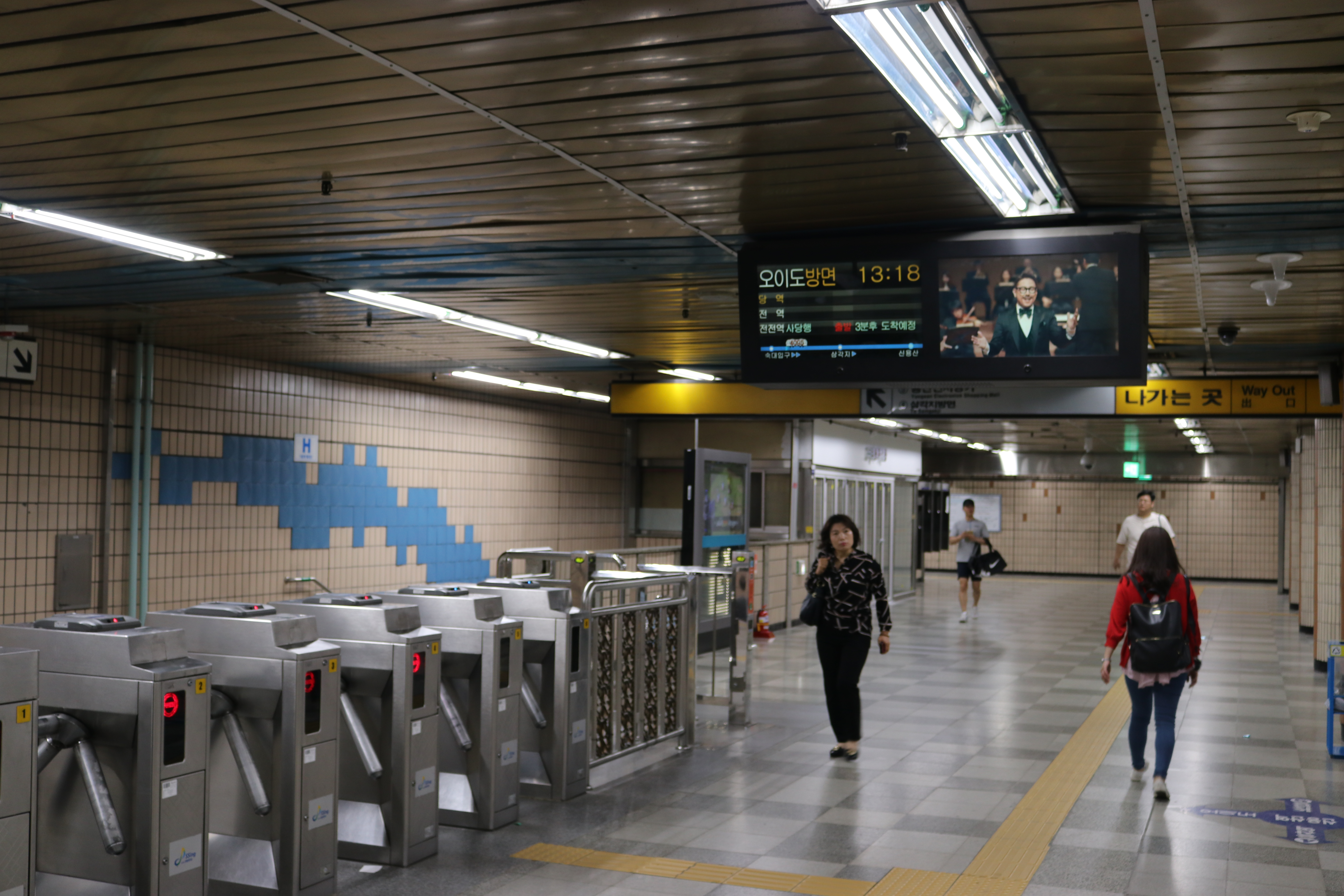 신용산역 대합실